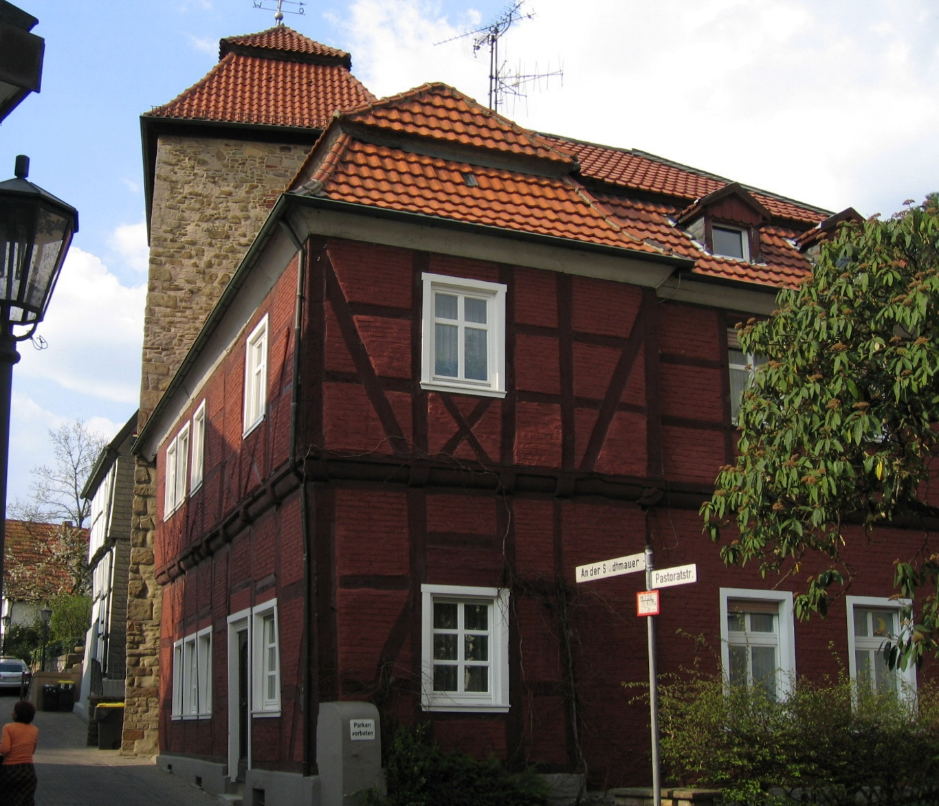 Description: Unter Denkmalschutz stehendes zweigeschossiges Fachwerkhaus in backsteinverfüllter Kragenbauweise mit Doppelwalmdach. Andreaskreuze im Obergeschoss. Ehemalige und einzige Seilerei in Menden (Sauerland). Source: selbst fotografiert Date: 25. Apr. 2006 Author: Asio otus